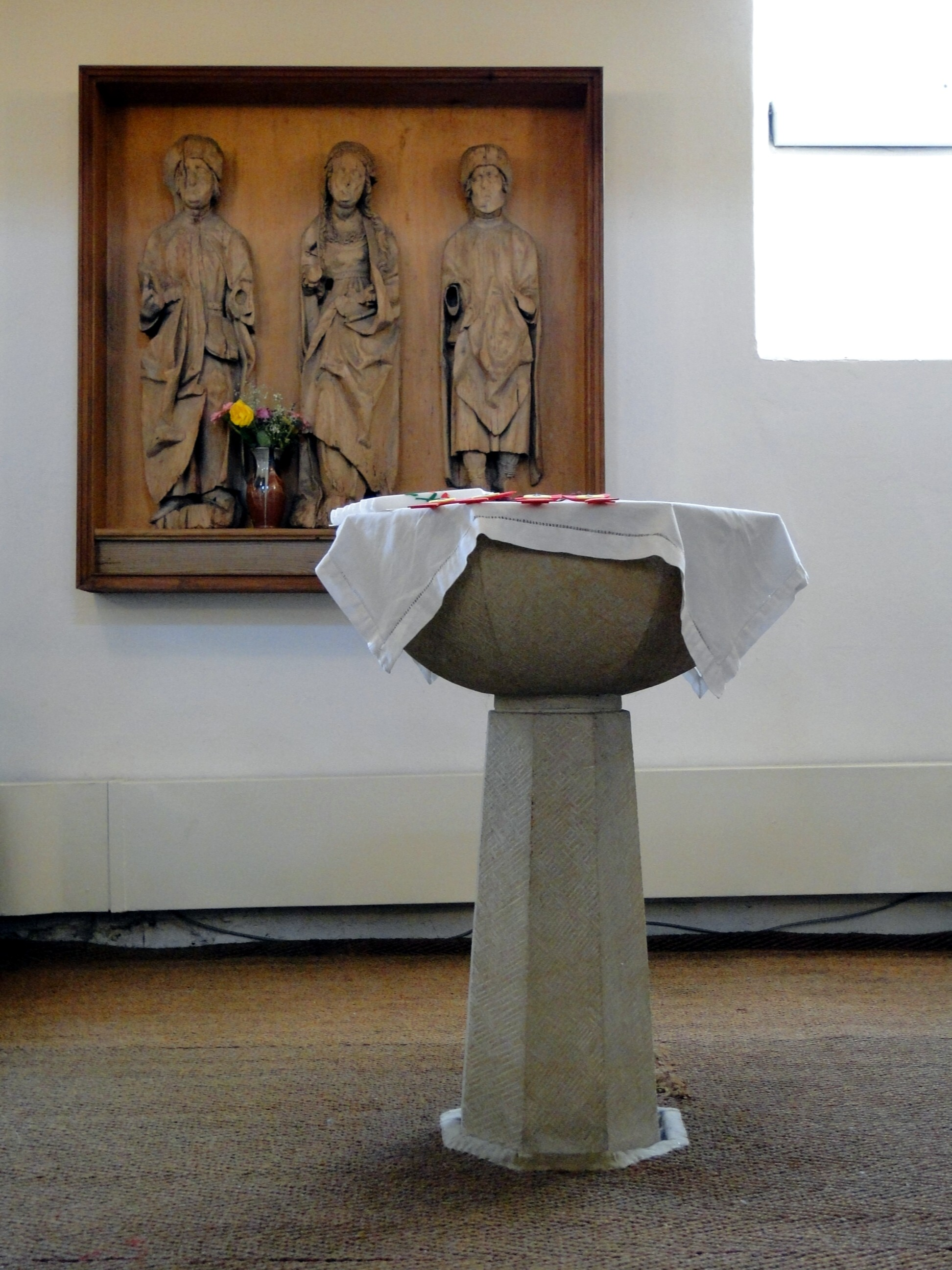 Schrein und Taufstein der Alten Kirche Klotzsche